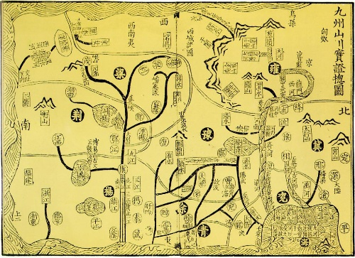 《禹贡山川地理图》之《九州山川实证总图》作于南宋淳熙四年（1177年），描绘大禹治水成功后分天下为九州。（图上方指向西方，江河自西東下）